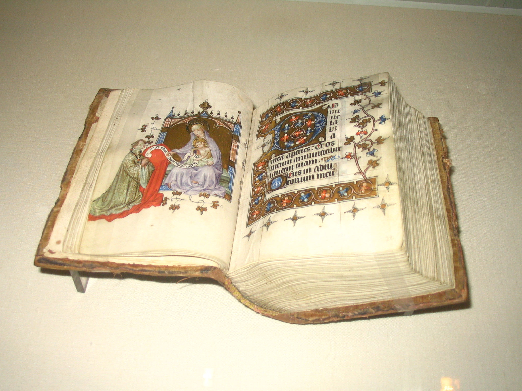 Enluminure. Musée Calouste Gulbenkian. Lisbonne